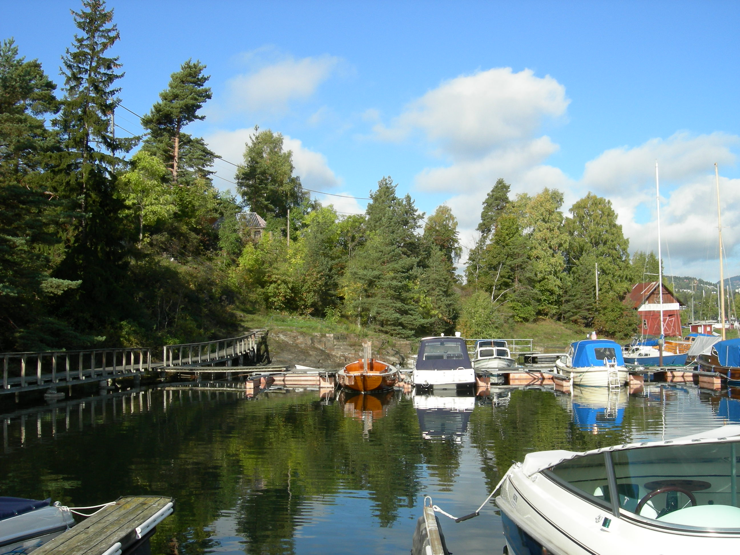 Killingen ved Bygdøy, Oslo, nordenden av båthavnen